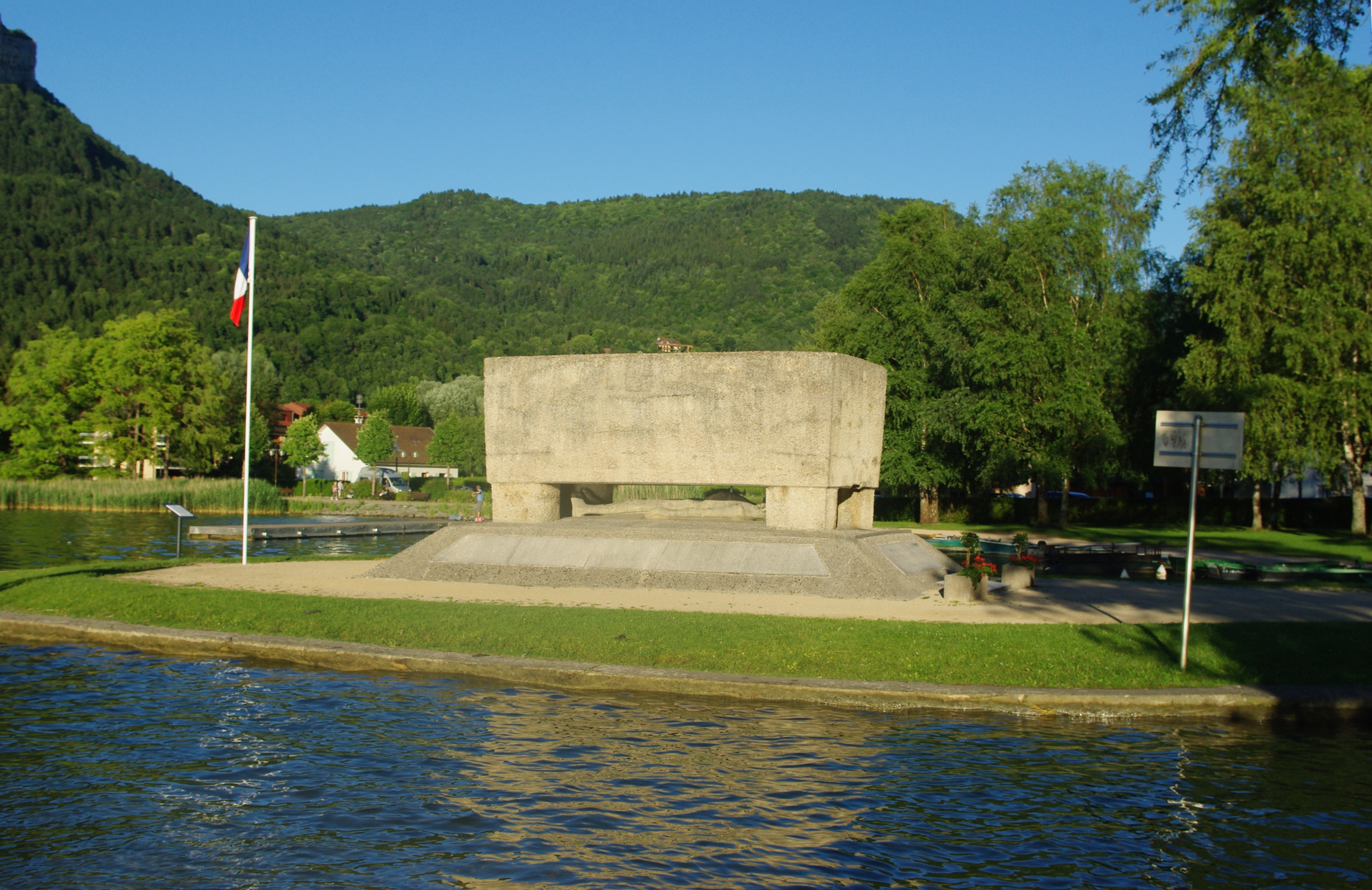 Mémorial aux déportés de l'Ain de Nantua par Louis Leygue, premier mémorial aux déportés érigé en France